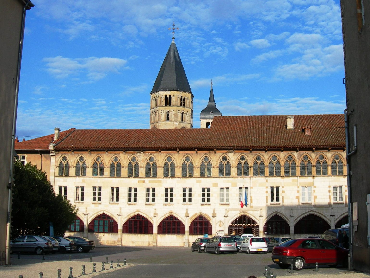 Cluny, palais du pape Gelase)